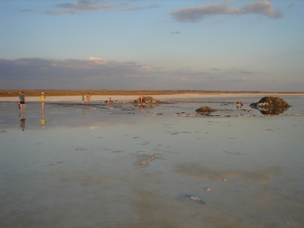 Lake Elton in summer